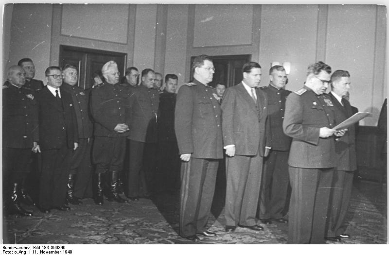 ADN-ZB SNB Empfang bei Armee-General W.J. Tschuikow am 11.11.1949. Armeegeneral W.J. Tschuikow, der Chef der neugeschaffenen Sowjetischen Kontrollkommission (SKK), der die Kontrolle über die Durchführung der Bestimmungen und Prinzipien des Potsdamer Abkommens obliegt, empfängt die Mitglieder der Regierung der Deutschen Demokratischen Republik. Die SKK löst die Sowjetische Militär-Administration (SMA) ab, deren Funktionen an die deutschen Staatsorgane übergeben. UBz: Die sowjetischen Vertreter. Vorn Armeegeneral W.J. Tschuikow, 3. Reihe 4. v.l.General Alexander Kotikow. 4547-49